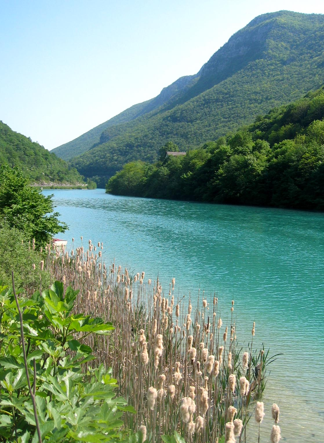 Soča river, between Tolmin and Solkan (Nova Gorica), Slovenia